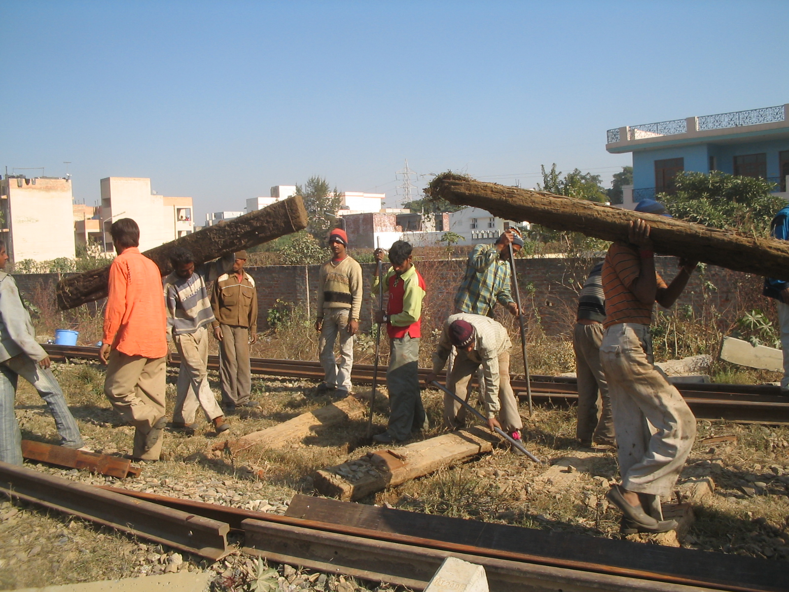 Indian Railways Track Maintenance, Dec 2007, in Jalandhar, Punjab, India